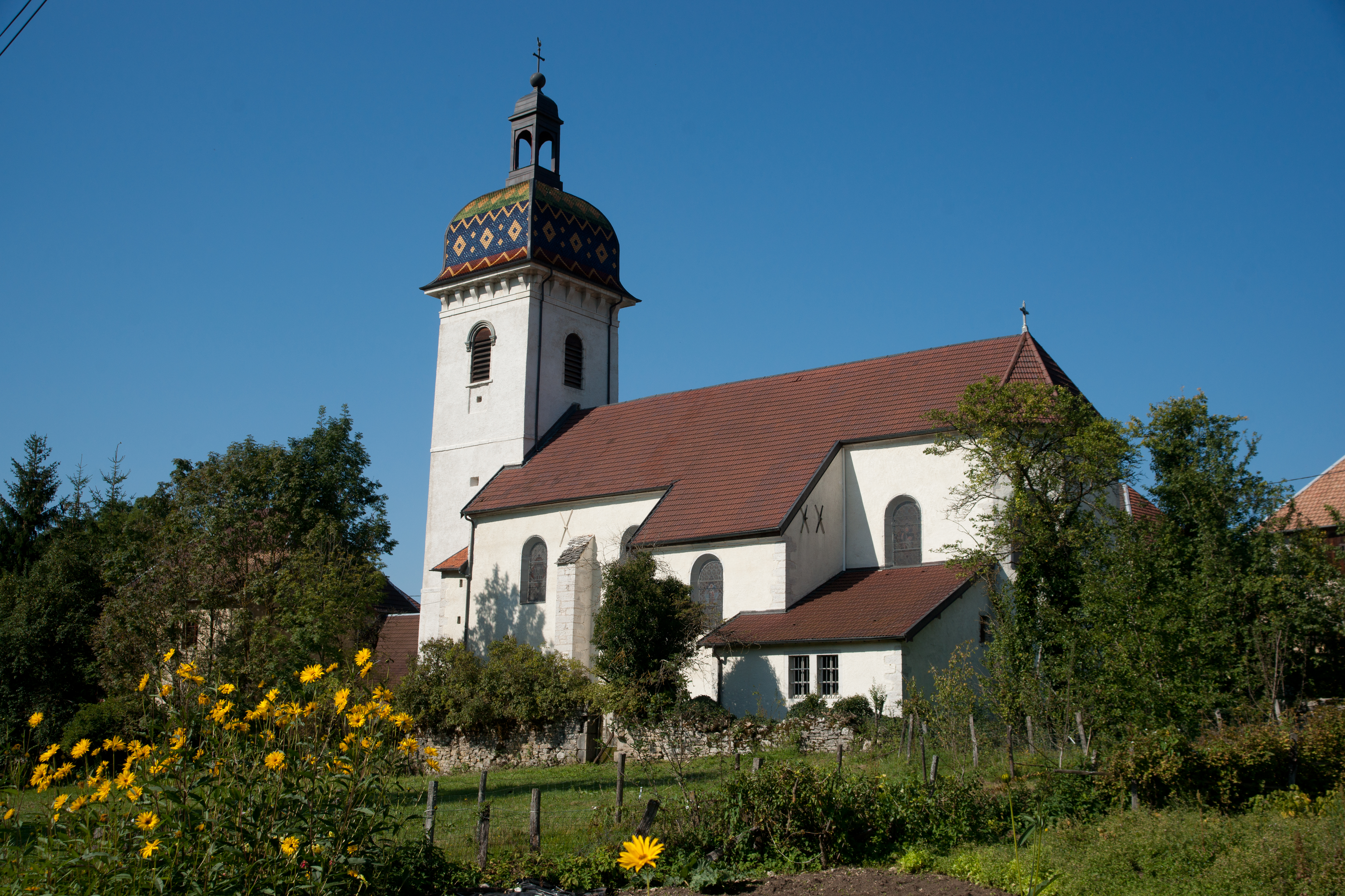 L'église d'Aubonne dans le Doubs, France.